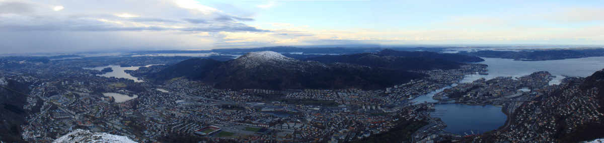 Panorama de Bergen vu de Ulrikken